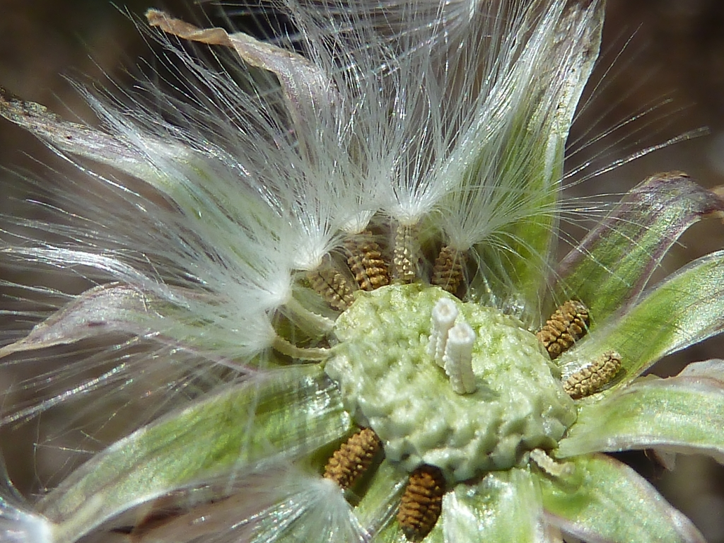 Reichardia gr. tingitana (Cosconilla, lechugilla dulce) - Cipselas, las externas pardas y muy tuberculadas, las internas blancas y menos tuberculadas, in situ - José Cucú, Albatera (Alicante, España).